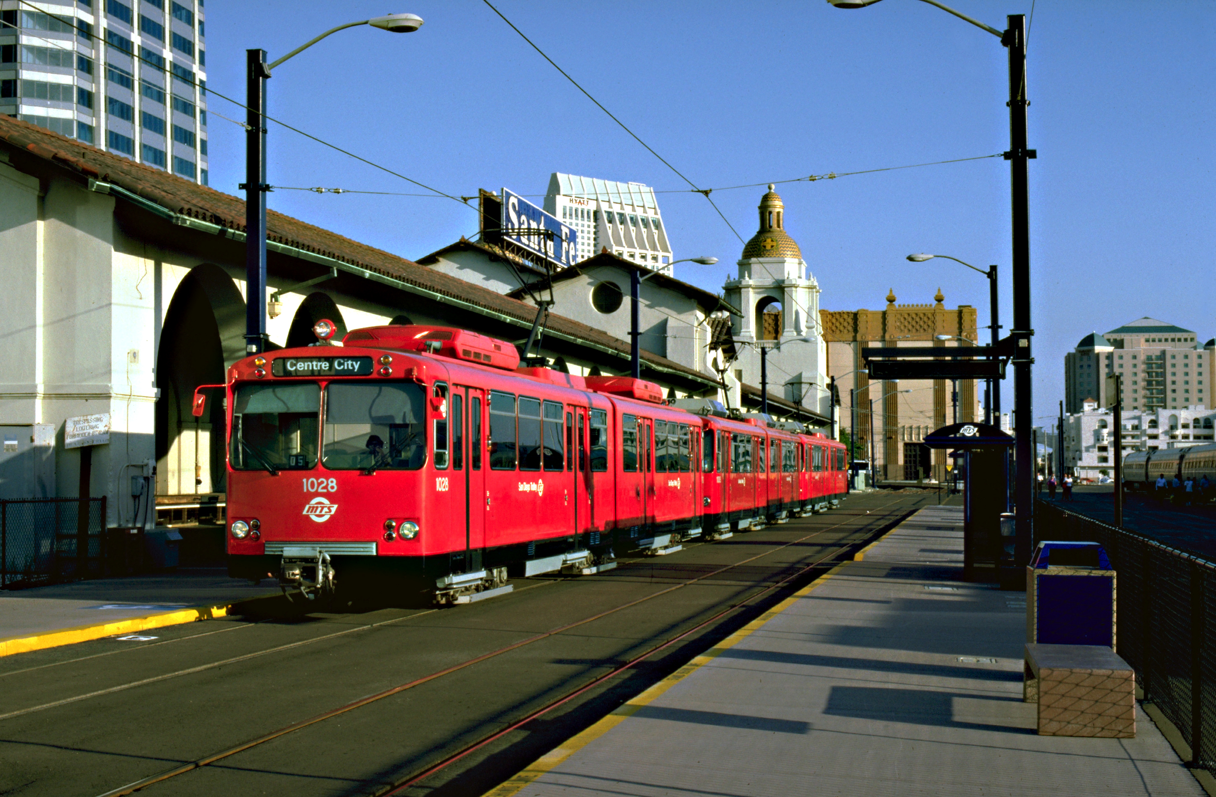 Driewagentrein in San Diego, DUWAG materieel